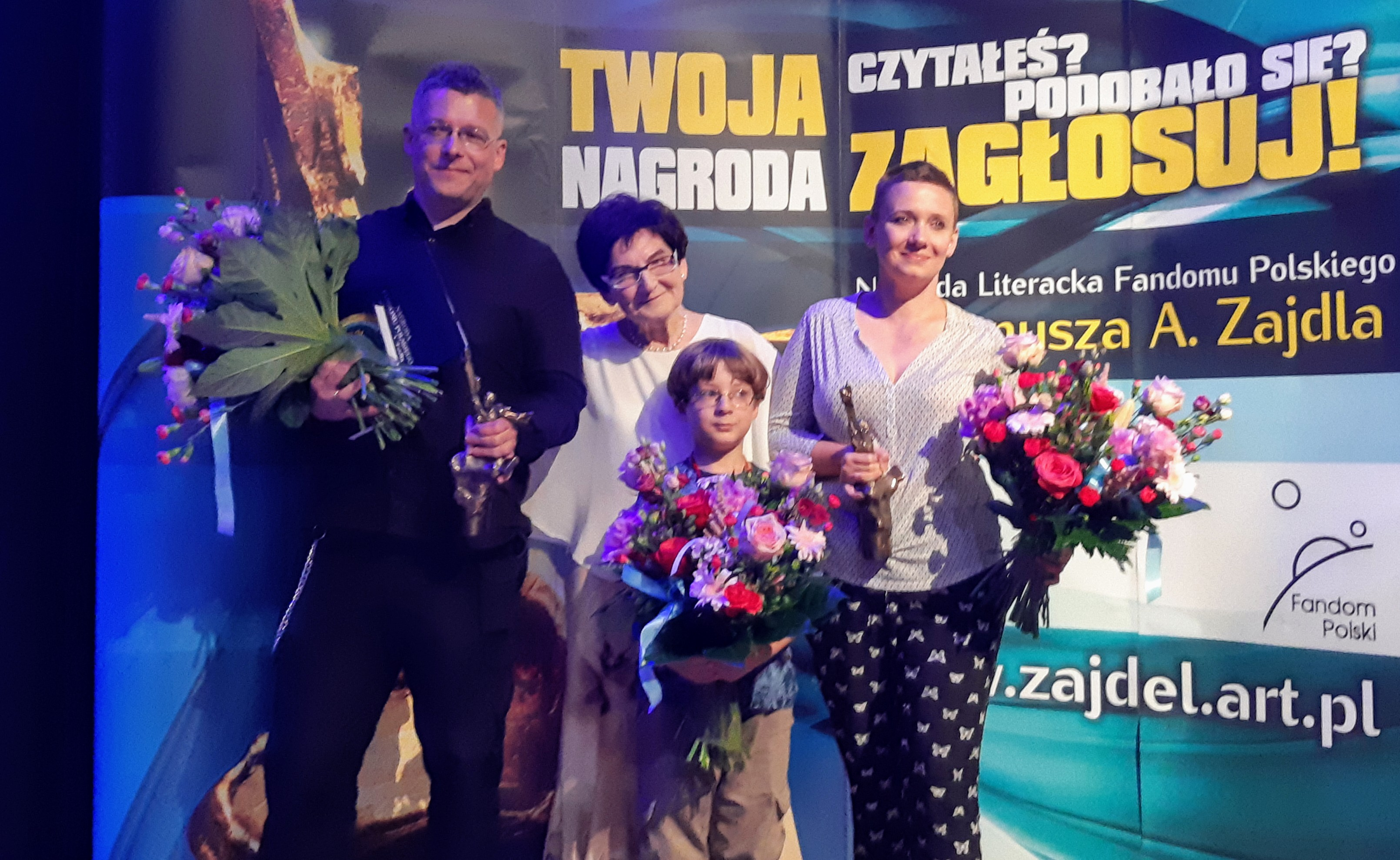 Rafał Kosik i Marta Kisiel w towarzystwie Jadwigi Zajdel i jej wnuczka, Polcon w Toruniu